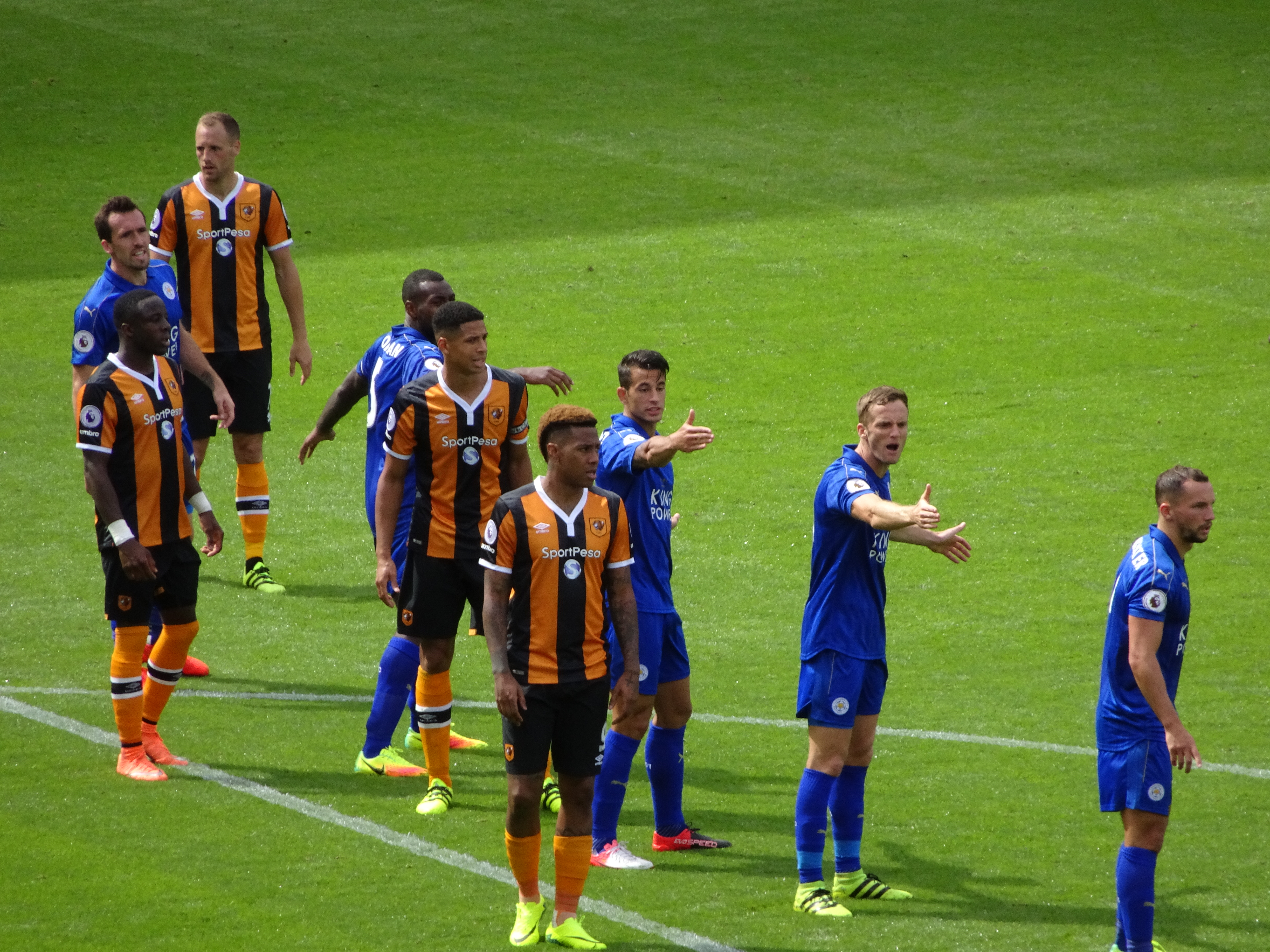 Leicester Line